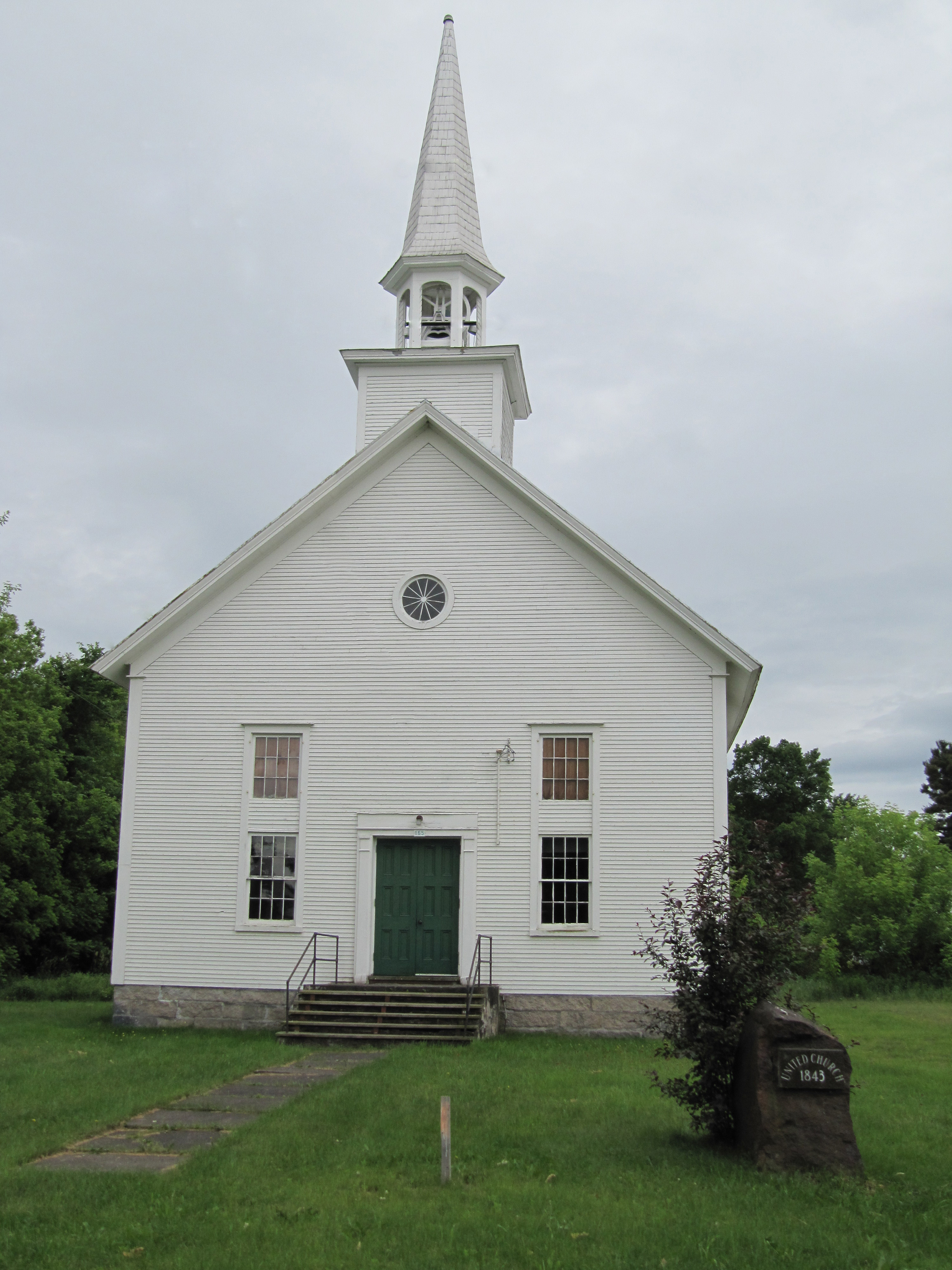 Église méthodiste (1834), aujourd'hui convertie en église Unie du Canada